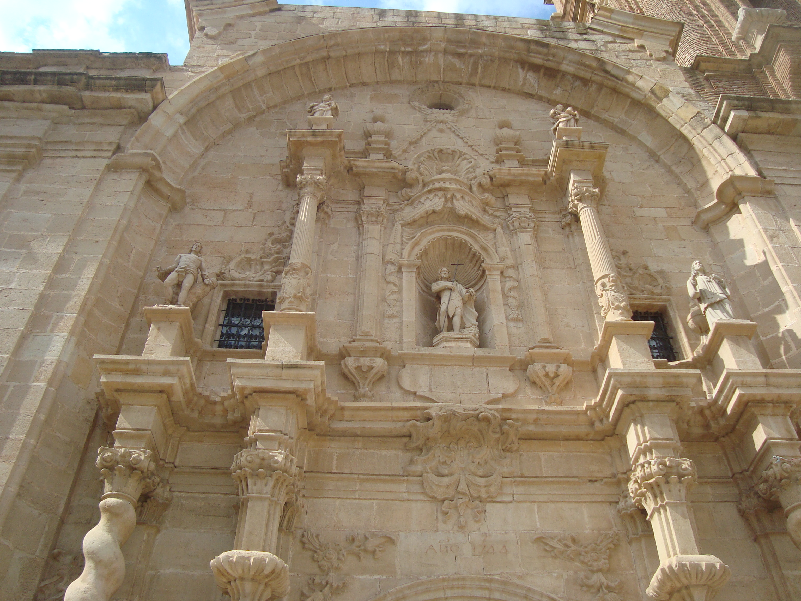 Església de Sant Joan Baptista (el Mas de les Mates)